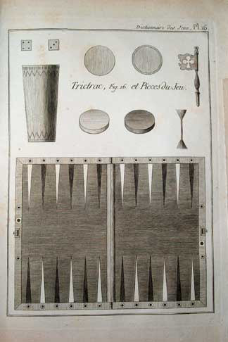 Tricktrack: Spielfeld und Spielutensilien einschließlich Spielsteinen (Herkunft der Abbildung: Lacombe, 1792, Dictionnaire des jeux)